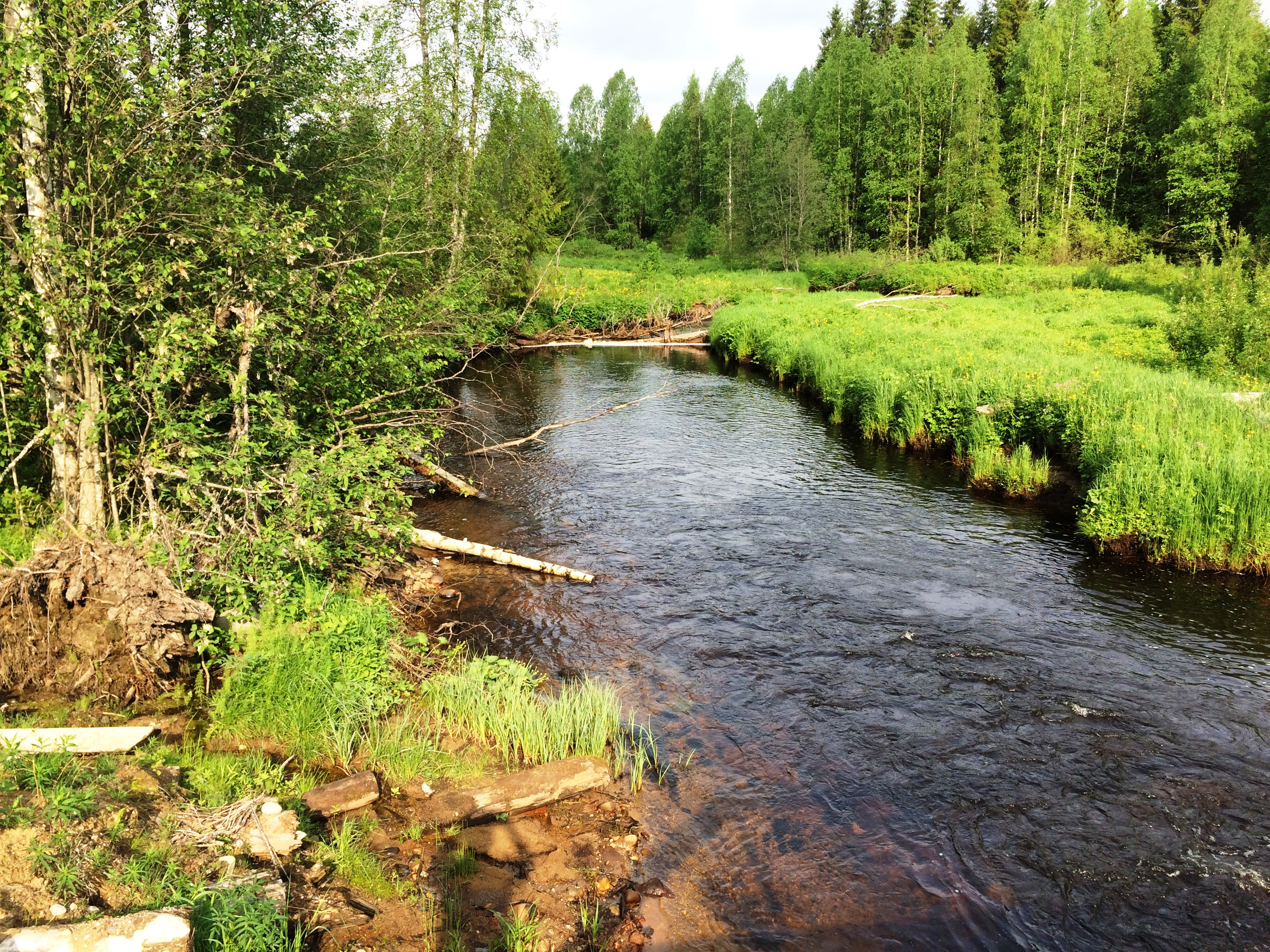 Кура (приток Видлицы)